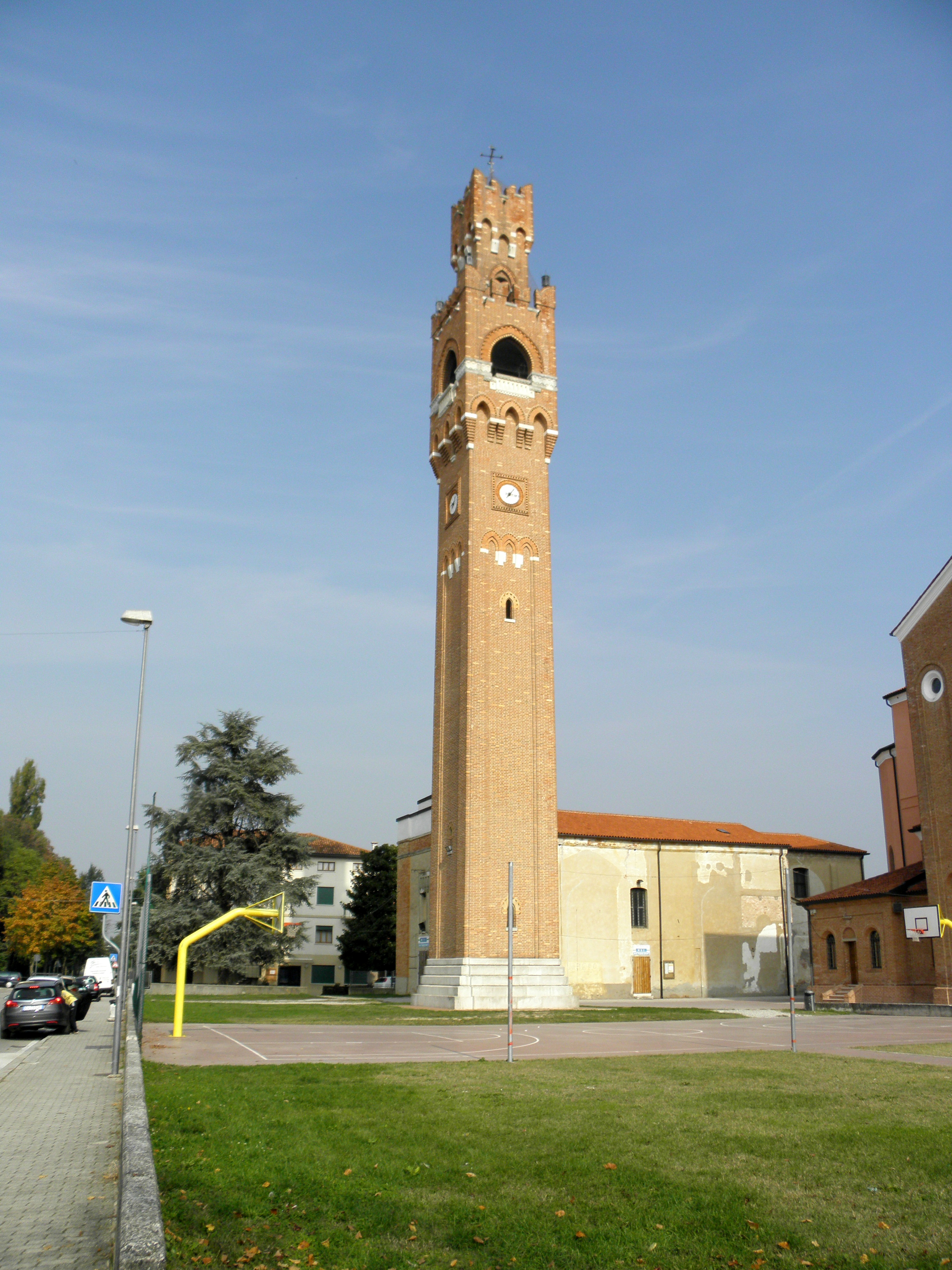 Peseggia, frazione di Scorzè: il campanile della chiesa parrocchiale di San Nicolò Vescovo. Dietro si scorge la vecchia parrocchiale, sconsacrata e diventata sala cinema.